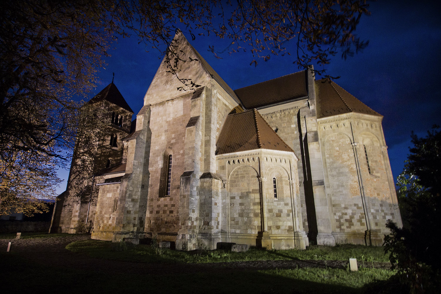 Református templom, volt premontrei prépostsági templom (Ócsa, Bercsényi u.) This is a photo of a monument in Hungary. Identifier: 7192